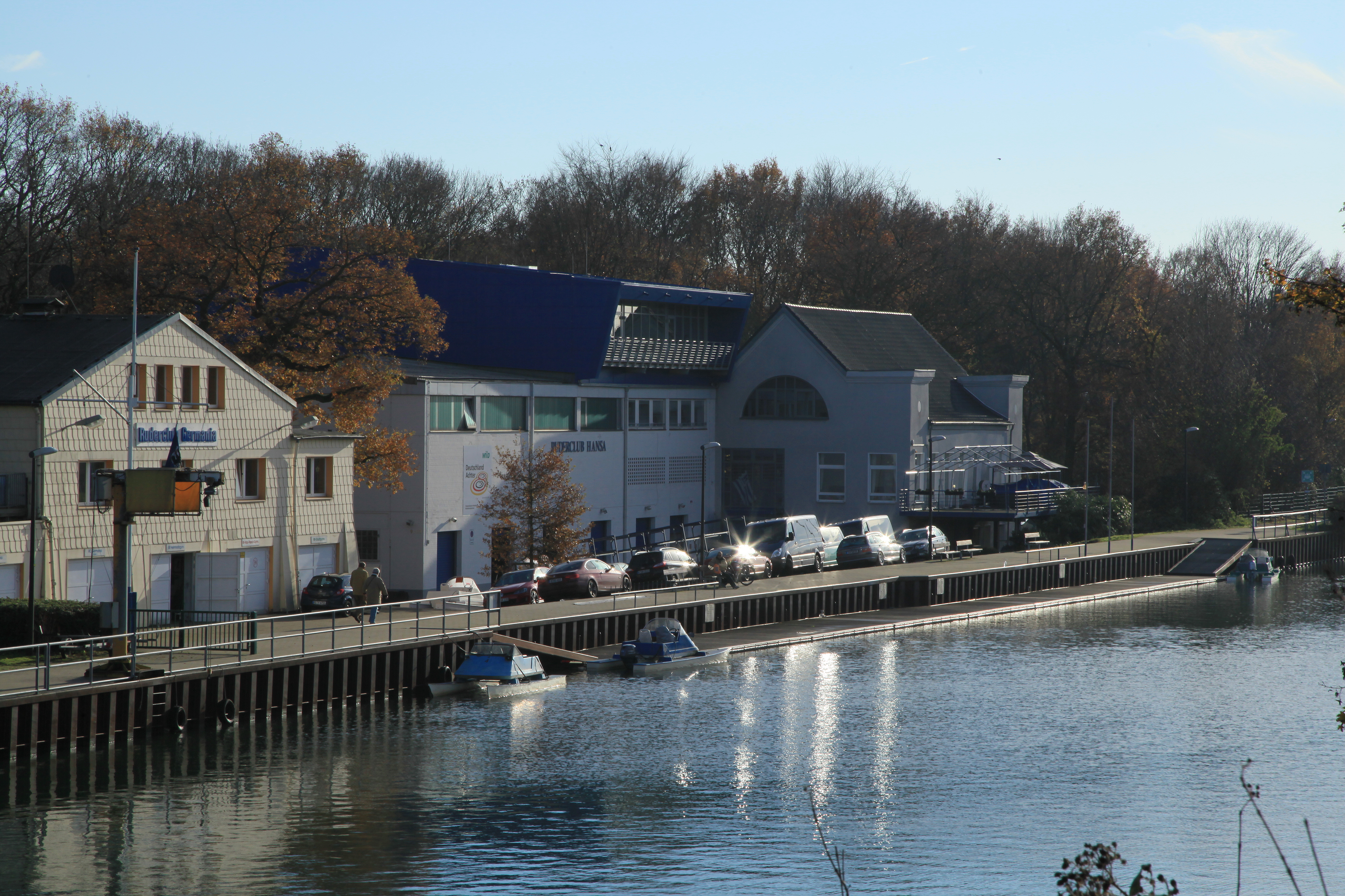 Blick von der Kanalbrücke Weidenstraße auf den Dortmund-Ems-Kanal und An den Bootshäusern in Dortmund